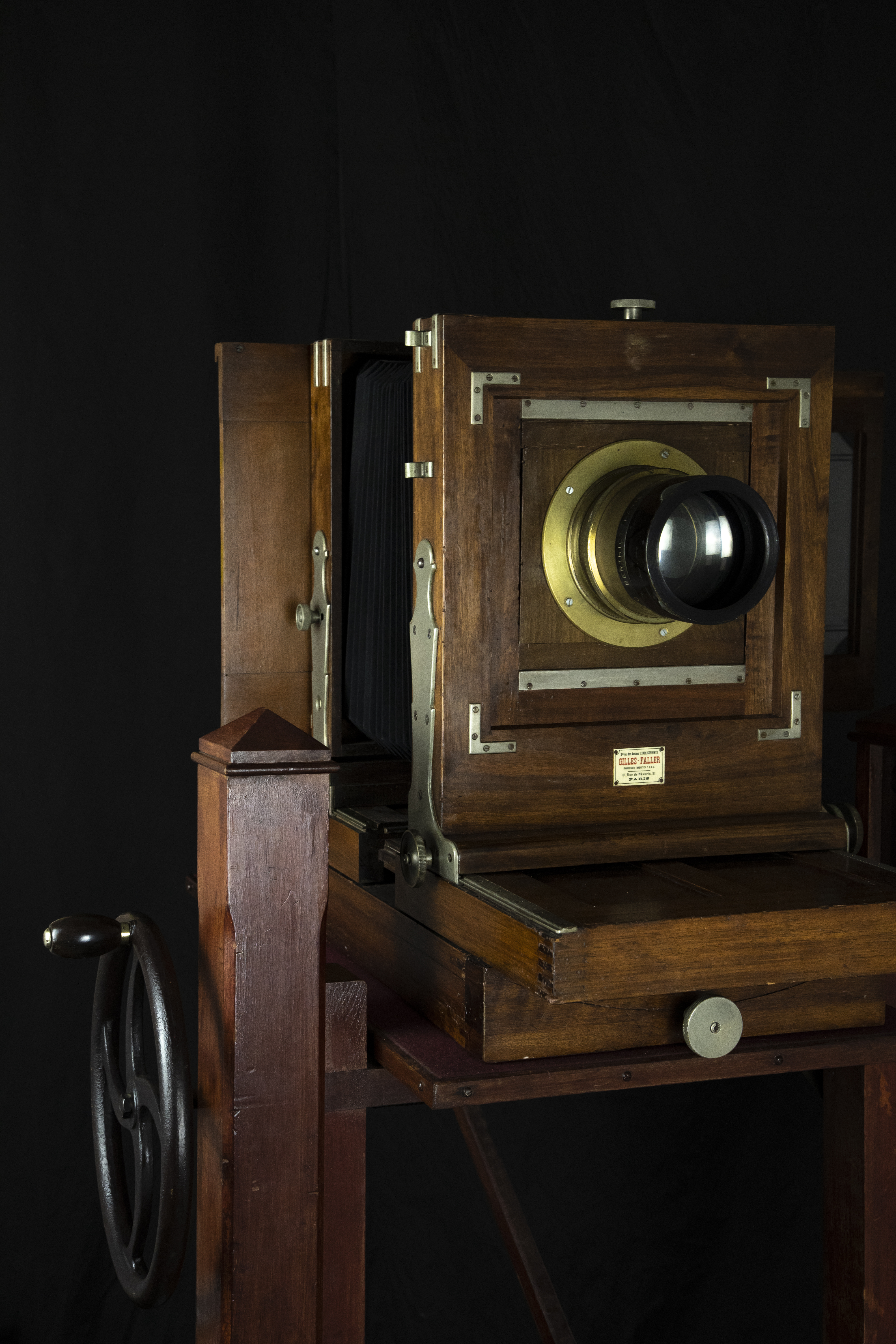 Chambre Gilles Faller sortie des ateliers de fabrication de la rue de Navarin Paris 9e au 19e siècle